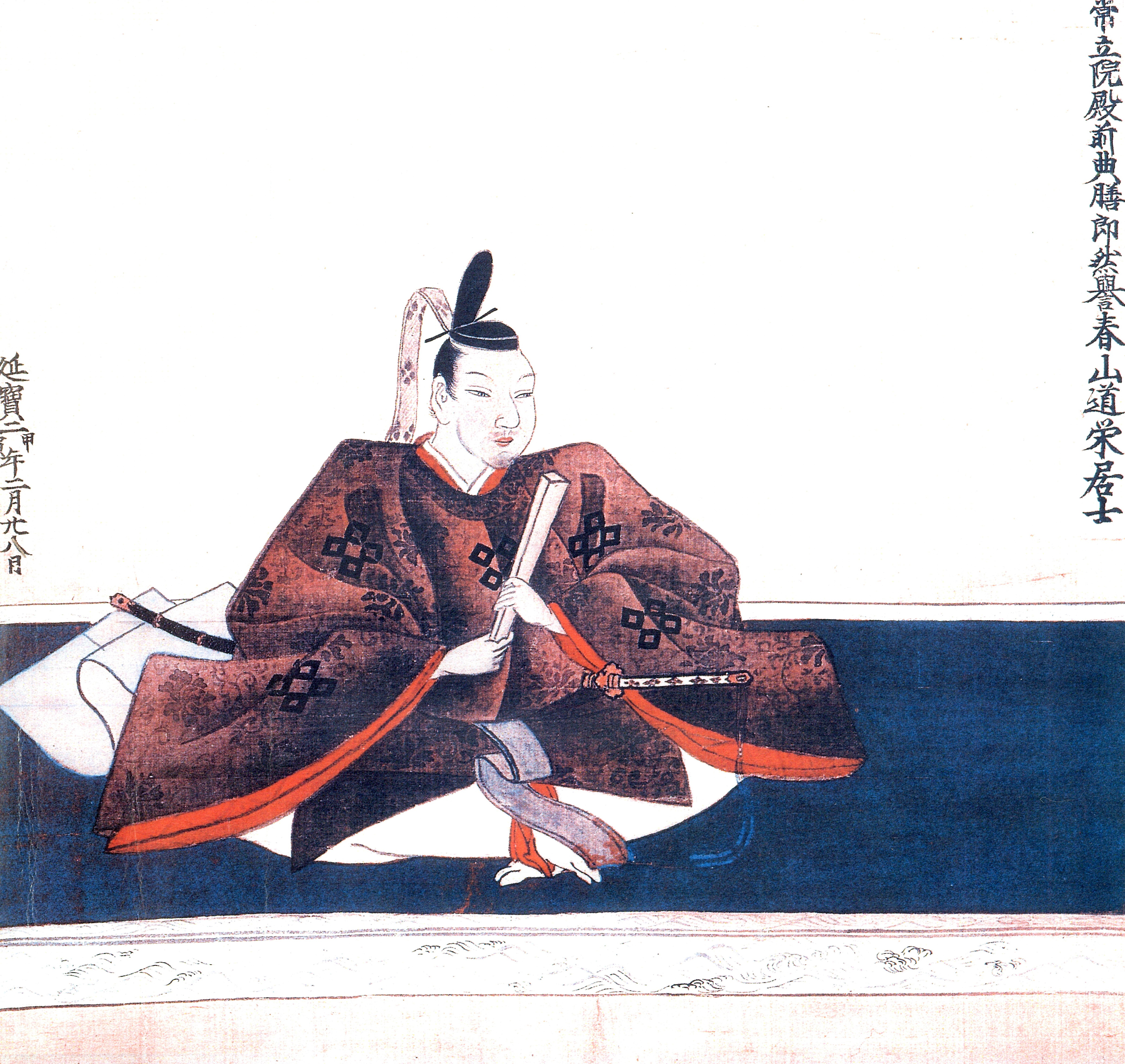 京極高供の肖像。